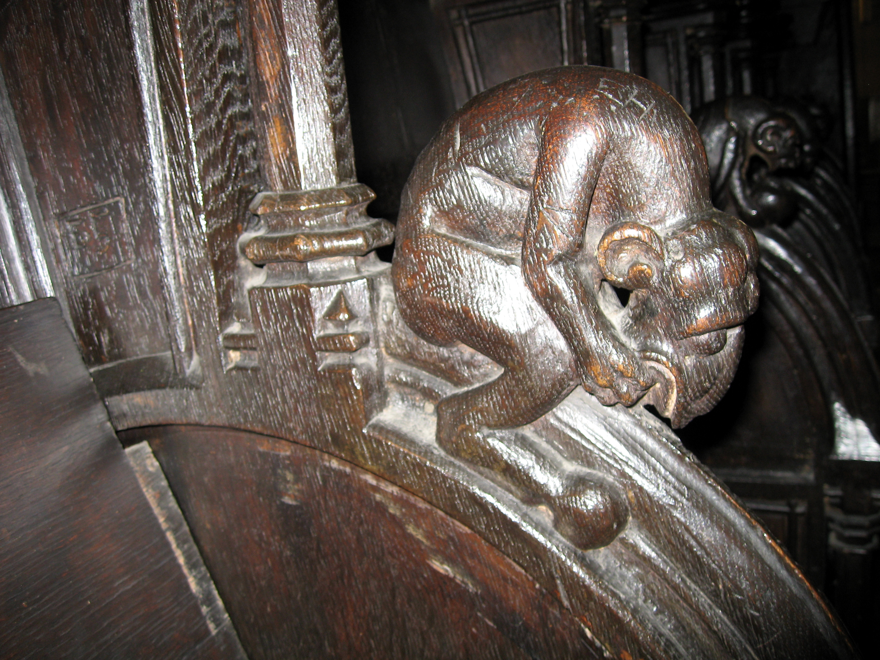 Dortmund, Marienkirche, Drôlerie am südlichen Chorgestühl